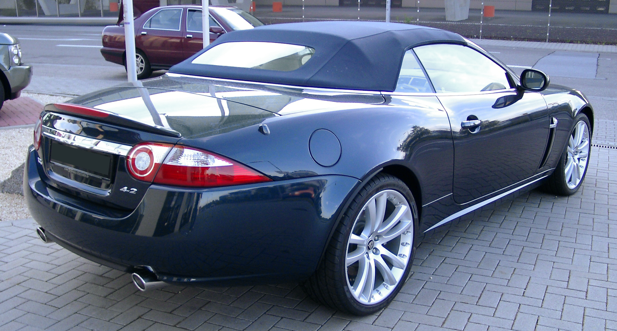 Jaguar_X150, 2006-er Version des XK